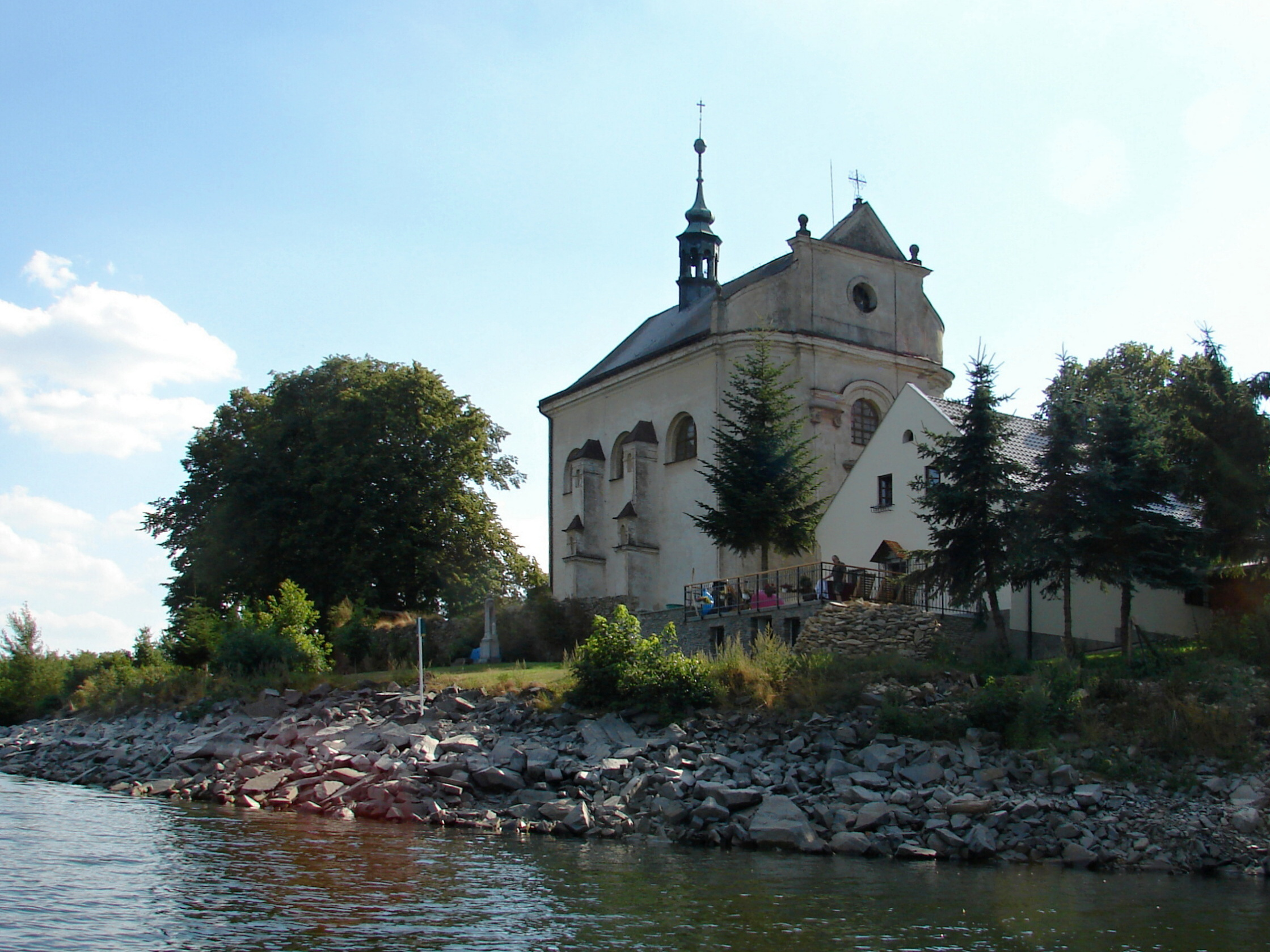 Kostel s. Jana Nepomuckého v zaniklé obci Karlovec